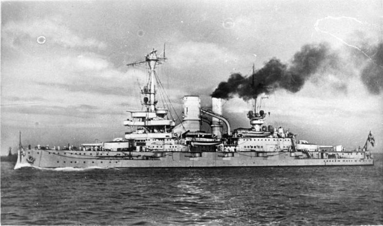 Linienschiff "Schleswig-Holstein" Linienschiff "Schleswig-Holstein" [Linienschiff "Schleswig-Holstein" nach Umbau mit zwei Schornsteinen auf See. Ansicht der Backbordseite. Evt. retuschierte Reichskriegsflagge] Information added by Wikimedia users.